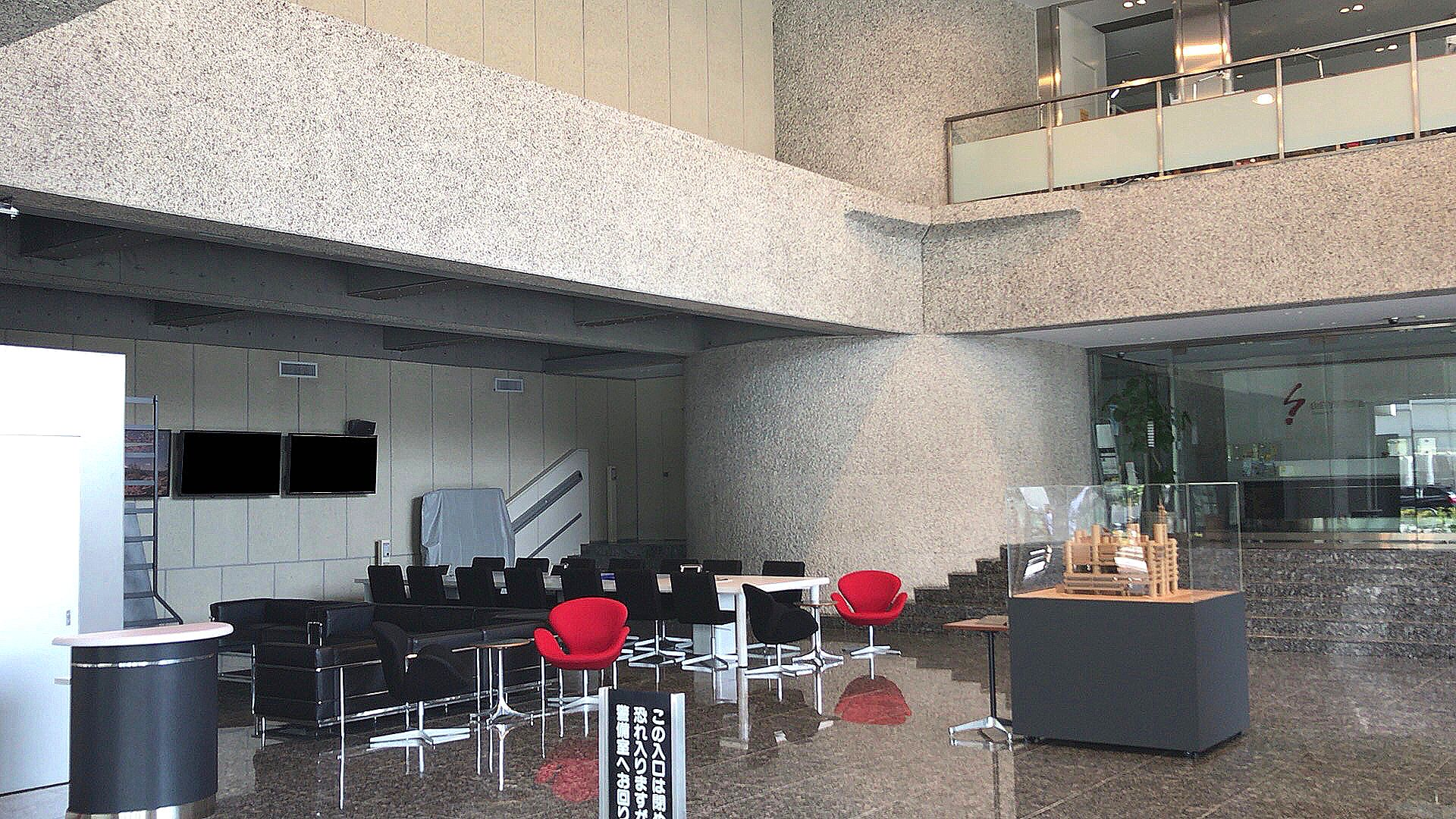 2002年から2006年まで山梨放送のスタジオ「スタジオふらっと」が存在。